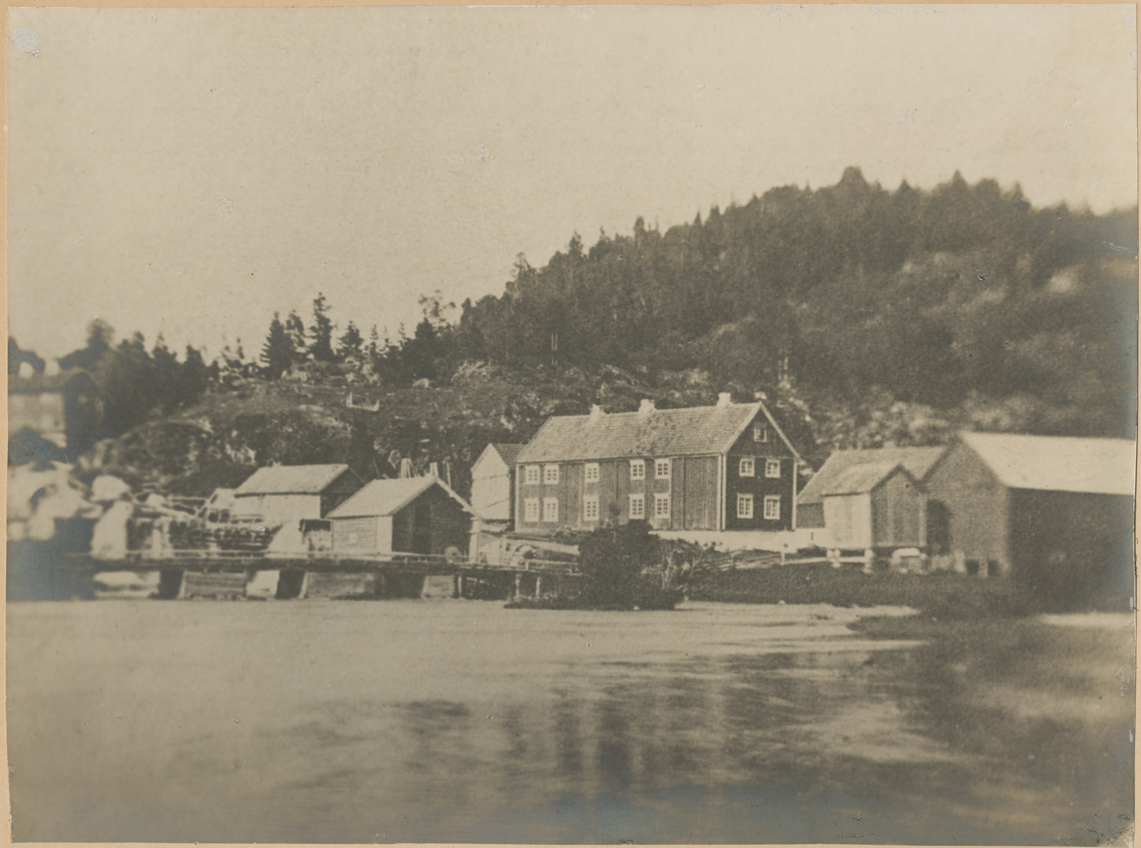 Hopla (227-1) i Åsen, fotografert før 1885. Til venstre skimtes Nydalen, en eiendom oppbygd av møller og handelsmann Johannes Brænne. Her ble Nydalens fabrikker anlagt på midten av 1880-tallet. Stuelåna midt i bildet gikk med da gårdstunet i Hopla brant i 1911. Fotograf / Photographer: Ukjent Fotoeier / Photo owner: Anne-Marie og Hermann Moe Digitalisering / Digitizing: Arne Langås Foto-ID / Photo ID: 003-0194 Har du utfyllende opplysninger? Legg gjerne igjen en kommentar nedenfor eller send e-post til . | Do you have additional information? Please leave a comment or send an e-mail to .